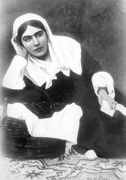 Юлия Вревска. Източник